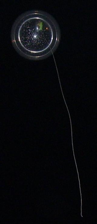 Fliegender durchsichtiger Gasballon, der zwei kleine grüne Leuchtstäbe in seinem Innern enthält, mit Blitz fotografiert